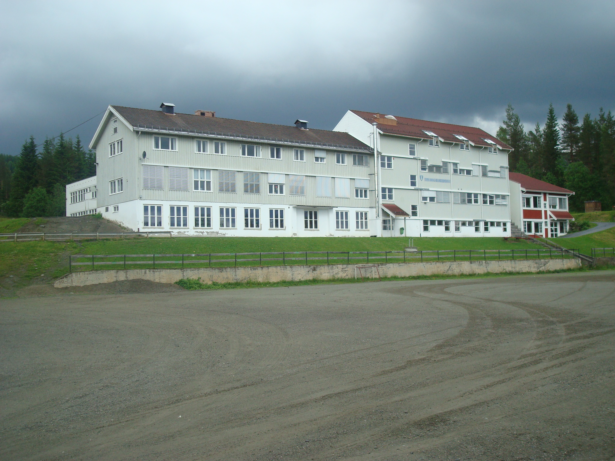 Torpa barne- og ungdomsskole